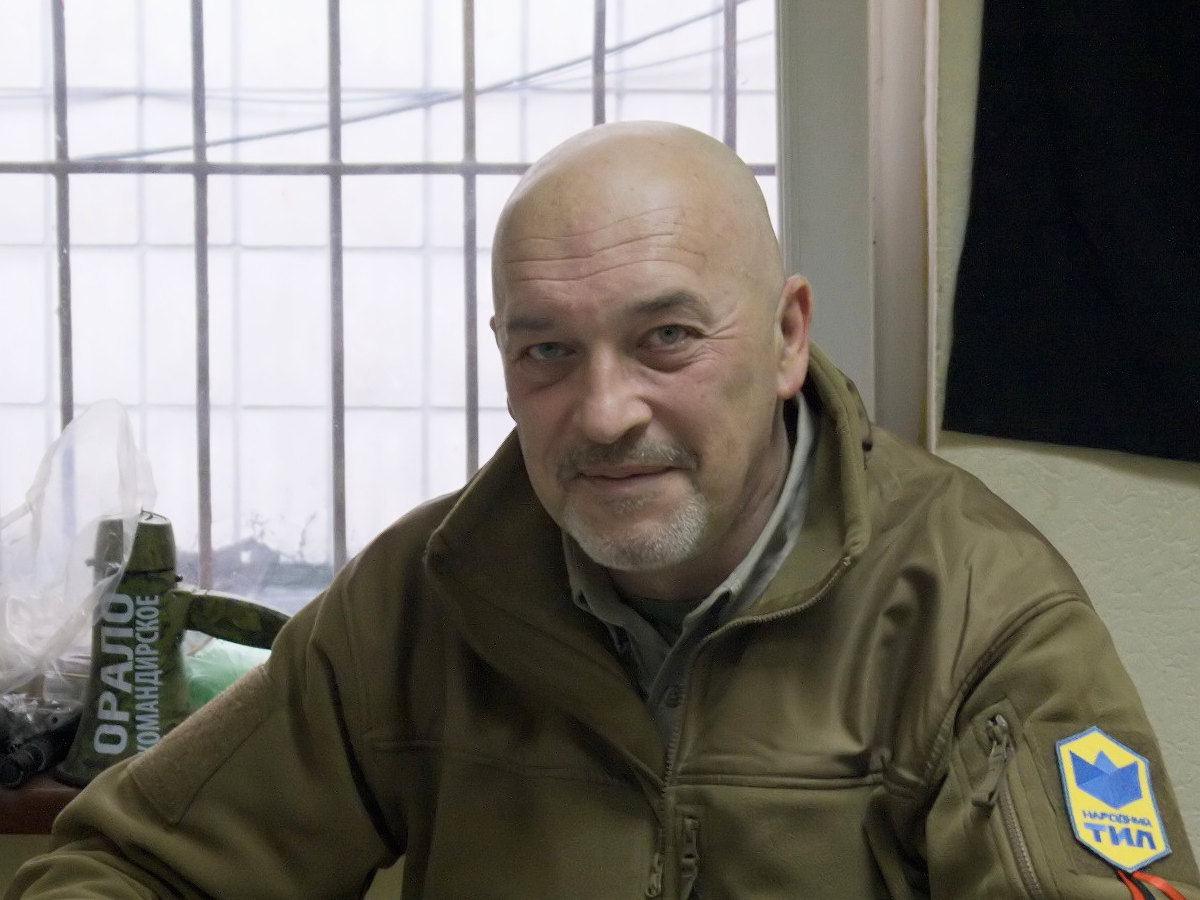 Георгій Тука, керівник волонтерського об'єднання Народний тил